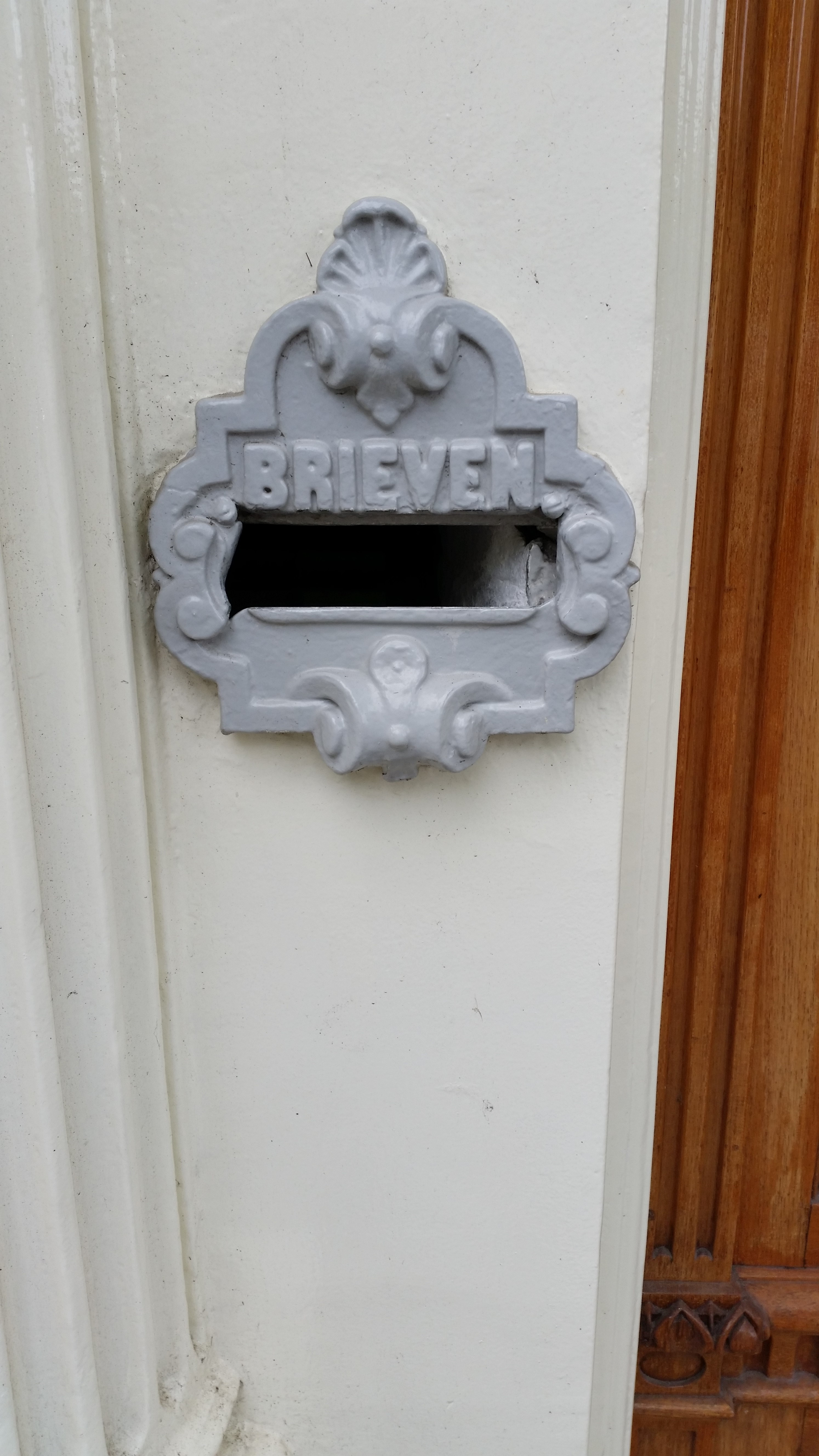 Impressie van het Potgieterhuis, Leliegracht 25, Amsterdam-Centrum met buste van Potgieter van Henri Teixeira de Mattos